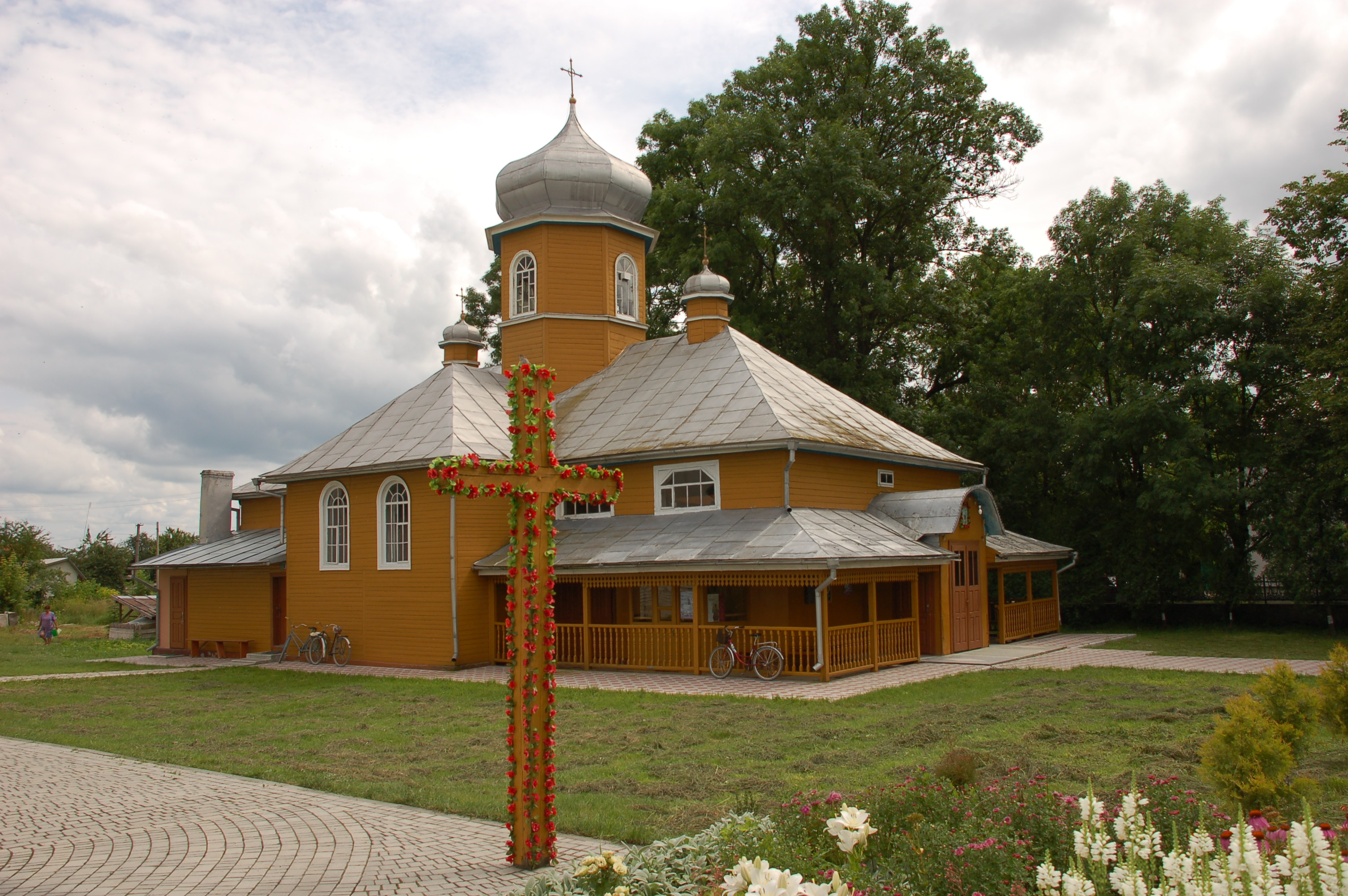 Stara Cerkiew Radziechów